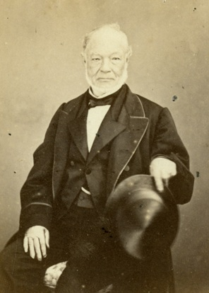 Fotografía del jurista y político argentino Salvador María del Carril.